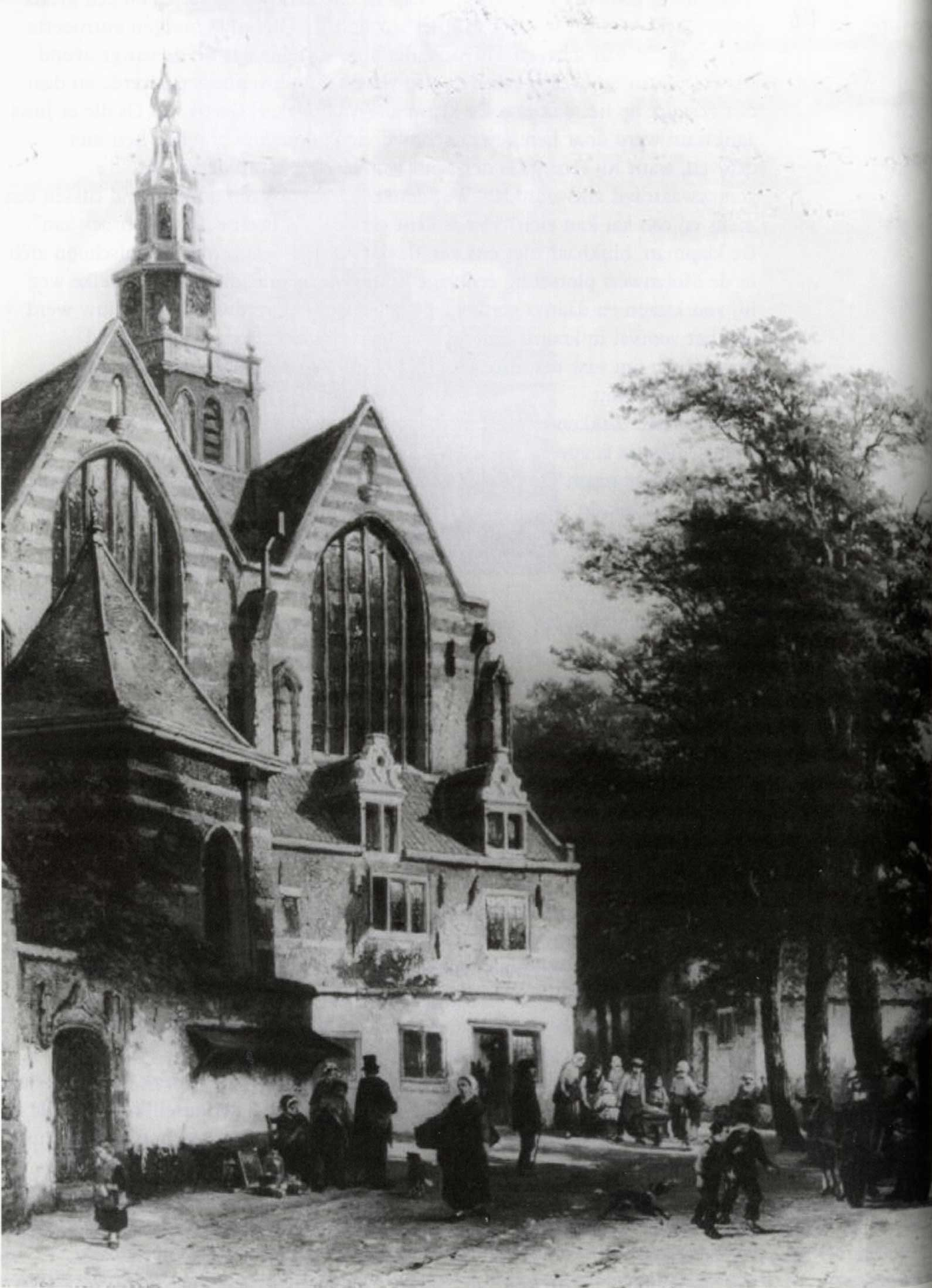 Kraamvrouwenportaal en zakkendragershuisje Sint-Janskerk Gouda